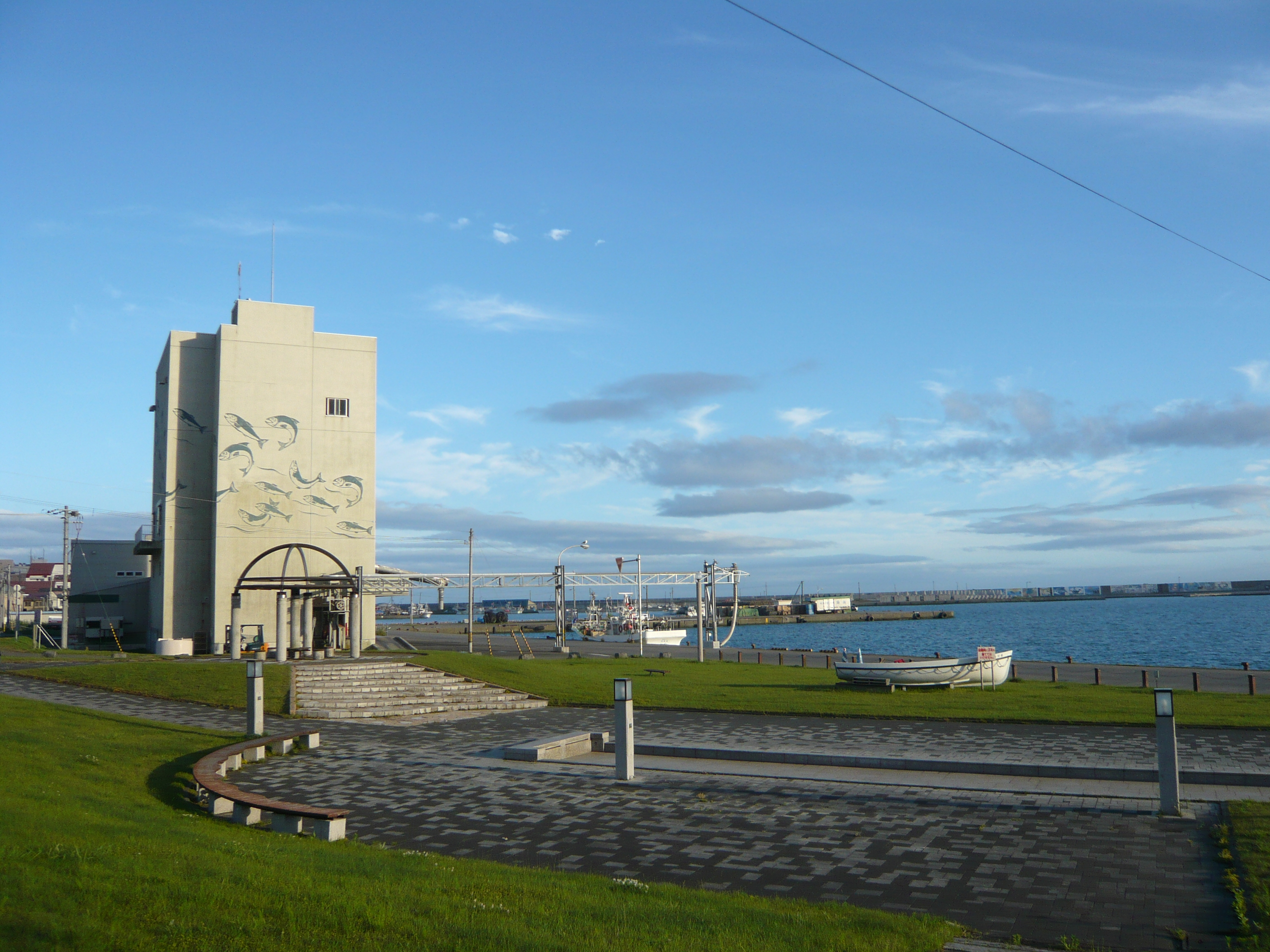 浦河港（2012年7月13日）